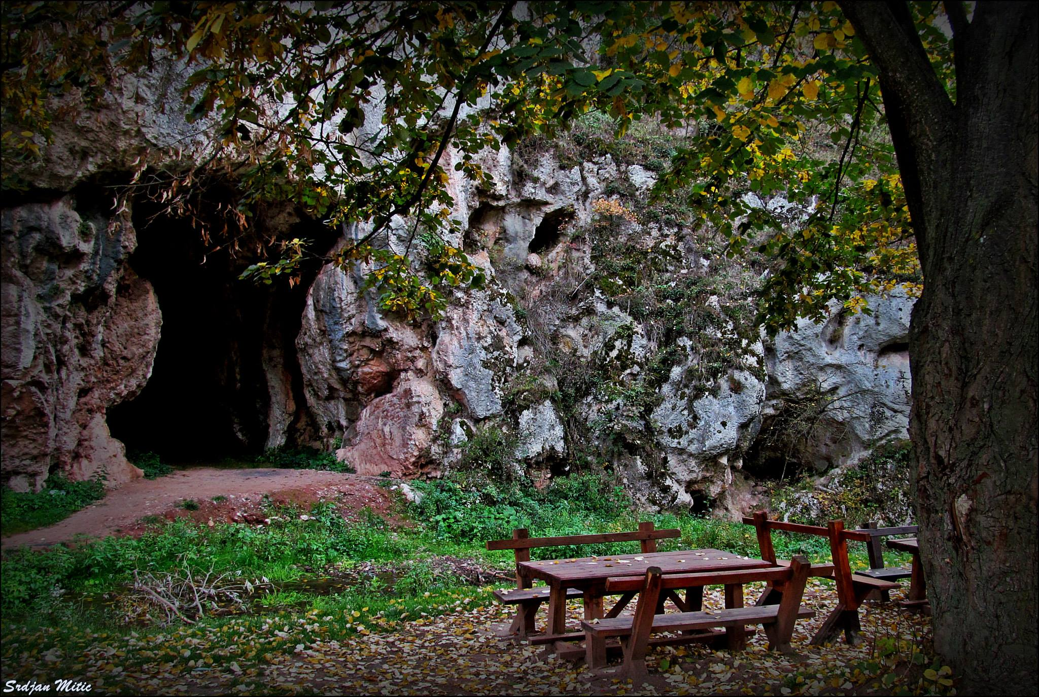 Српски (ћирилица): Поткапина у Јелашничкој клисури, Нишка Бања, Србија